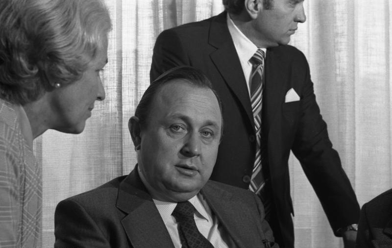 FDP-Bundesvorstand tagt im Bundeshaus